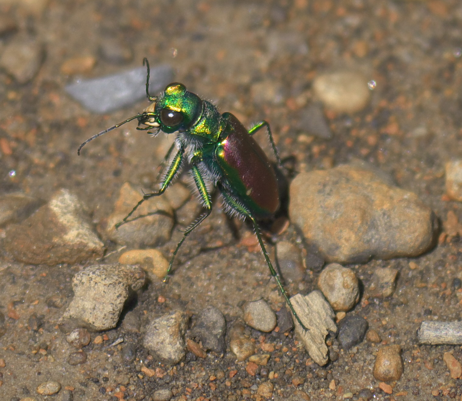 Cicindela splendida, Splendid Tiger Beetle, ID Confidence: 90